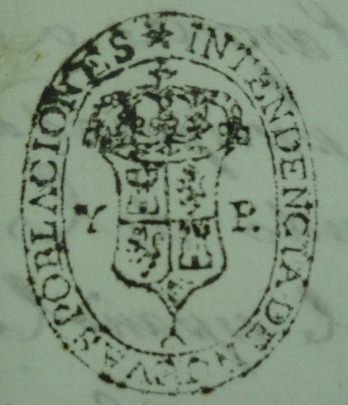 Sello de la Intendencia de Nuevas Poblaciones con el escudo de esta entidad administrativa